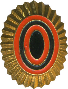 Общевойсковая кокарда Российской федерации. 2006—2011 В соответствии с Указом Президента Российской Федерации от 8 мая 2005 года N 531 "О военной форме одежды, знаках различия военнослужащих и знаках отличия" (в редакции Указа Президента РФ от 28 августа 2006 N 921 "О внесении изменений в Указ Президента Российской Федерации от 8 мая 2005 г. N 531 "О военной форме одежды, знаках различия военнослужащих и ведомственных знаках отличия") Приказом Министра обороны Российской Федерации от 24 октября 2006 г. N 395 введена единая кокарда для военнослужащих в виде вытянутой полусферы с боковой поверхностью, состоящей из 32 двухгранных лучей золотистого цвета с рифлеными гранями. Центральная часть кокарды - плоская и состоит из эллипса и концентрических полосок: первая (внешняя) покрыта оранжевой эмалью, вторая - черной, третья - оранжевой, эллипс, находящийся в середине, покрыт черной эмалью. В соответствии с Указом Президента Российской Федерации от 11 марта 2010 года N 293 "О военной форме одежды, знаках различия военнослужащих и ведомственных знаках отличия" Приказом Министра обороны РФ N 336 От 3 сентября 2011 г. N1500 "О Правилах ношения военной формы одежды и знаков различия военнослужащих Вооруженных Сил Российской Федерации, ведомственных знаков отличия и других геральдических знаков, учрежденных в установленном порядке, и особой церемониальной парадной военной формы одежды военнослужащих почетного караула Вооруженных Сил Российской Федерации" восстановлено ношение военнослужащими кокард образца 1994 года.